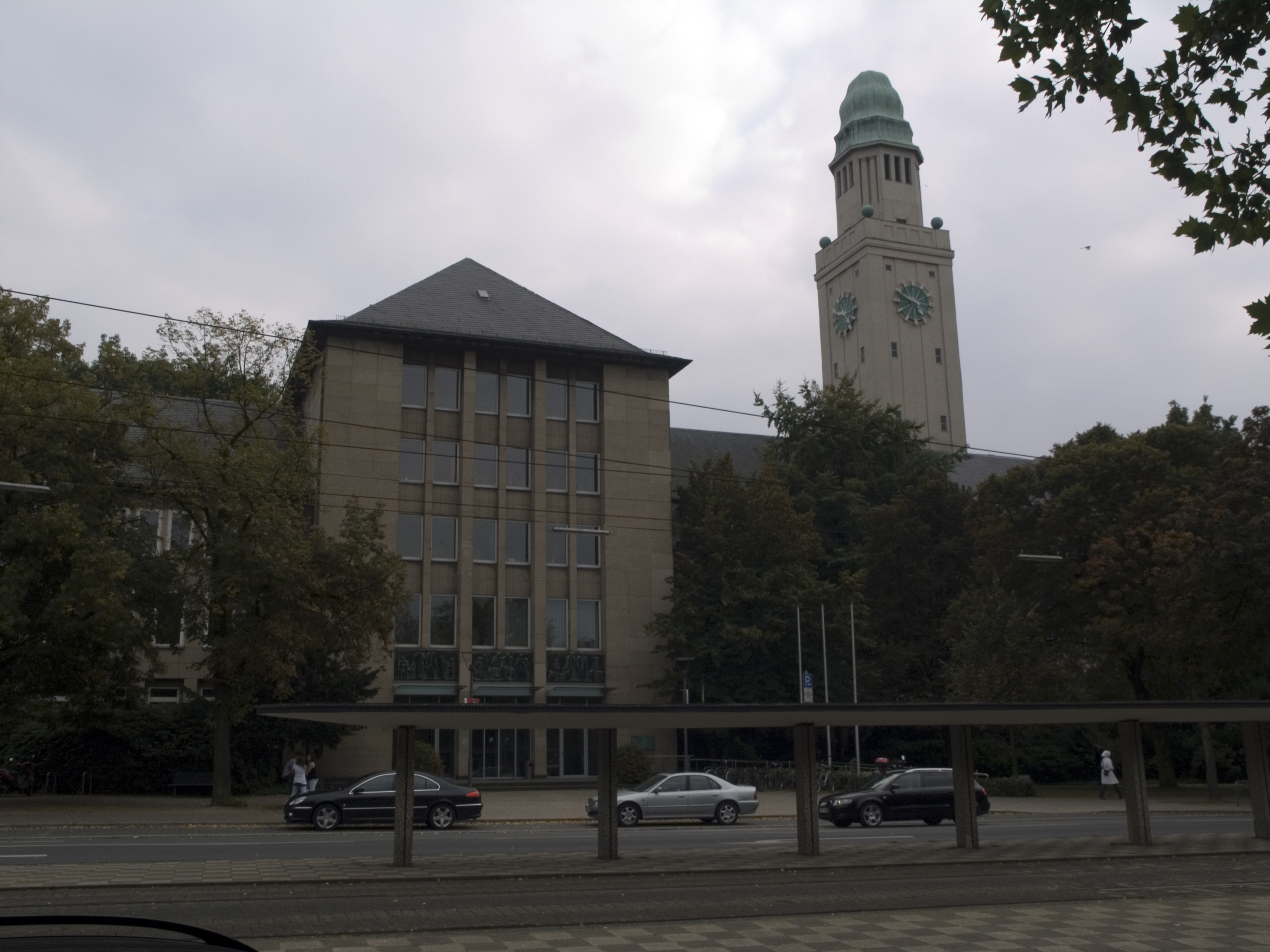 Rathaus Buer (Neubauseite) mit dem 1912 erbauten Turm des Altbaus im Hintergrund